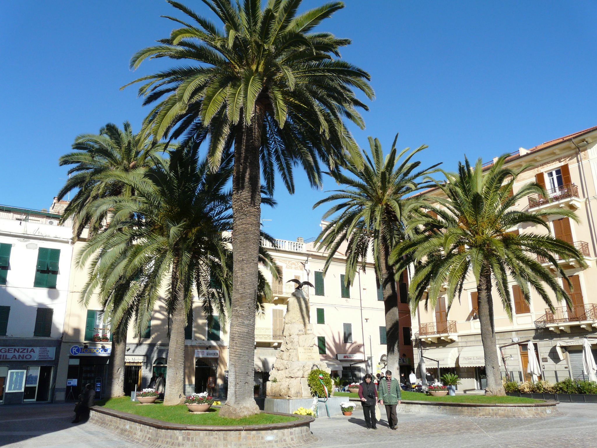 Piazza del torrione di Ceriale, Liguria, Italia